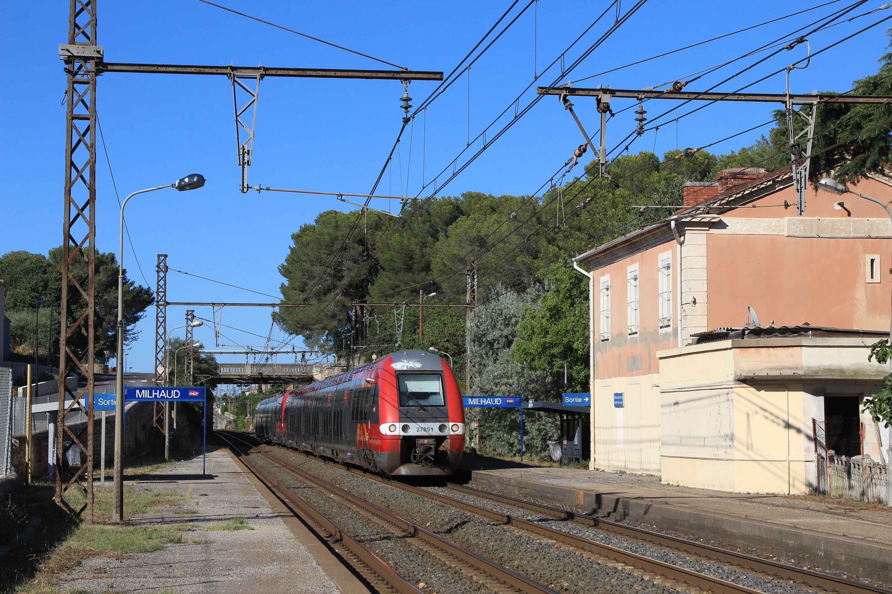 Deux ZGC franchissent la gare de Milhaud au TER 876427 (Avignon - Prpignan).